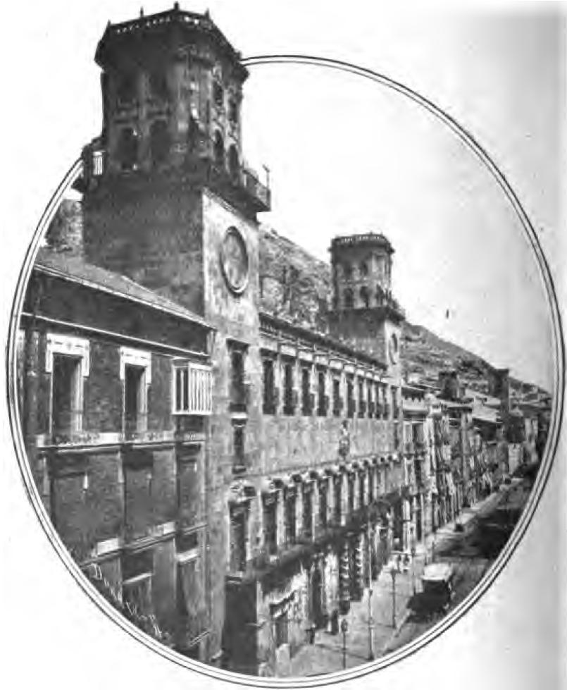 Alicante: Ayuntamiento